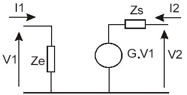 Schéma théorique d'un amplificateur électronique.